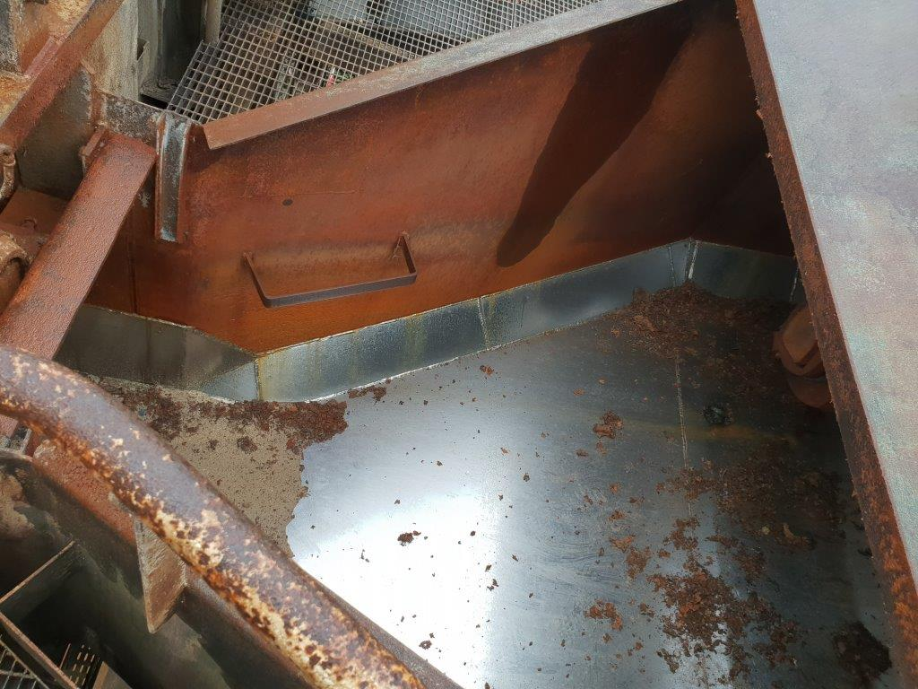 Nochère servant au transport des betteraves dans une laverie